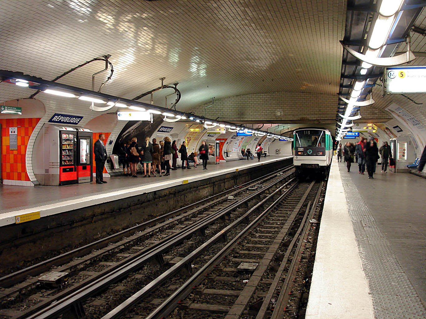 Station République de la ligne 3 du métro de Paris, France.